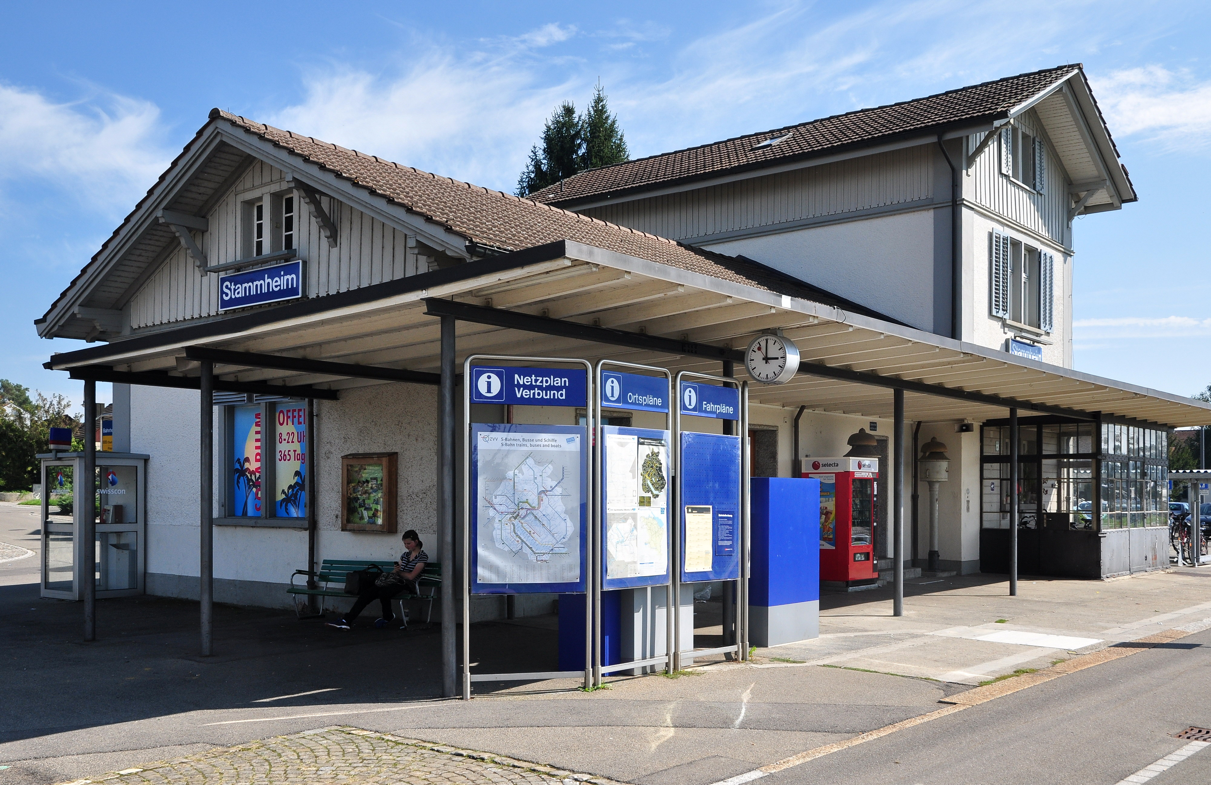 Bahnhof in Stammheim (Unterstammheim-Oberstammheim,Switzerland)